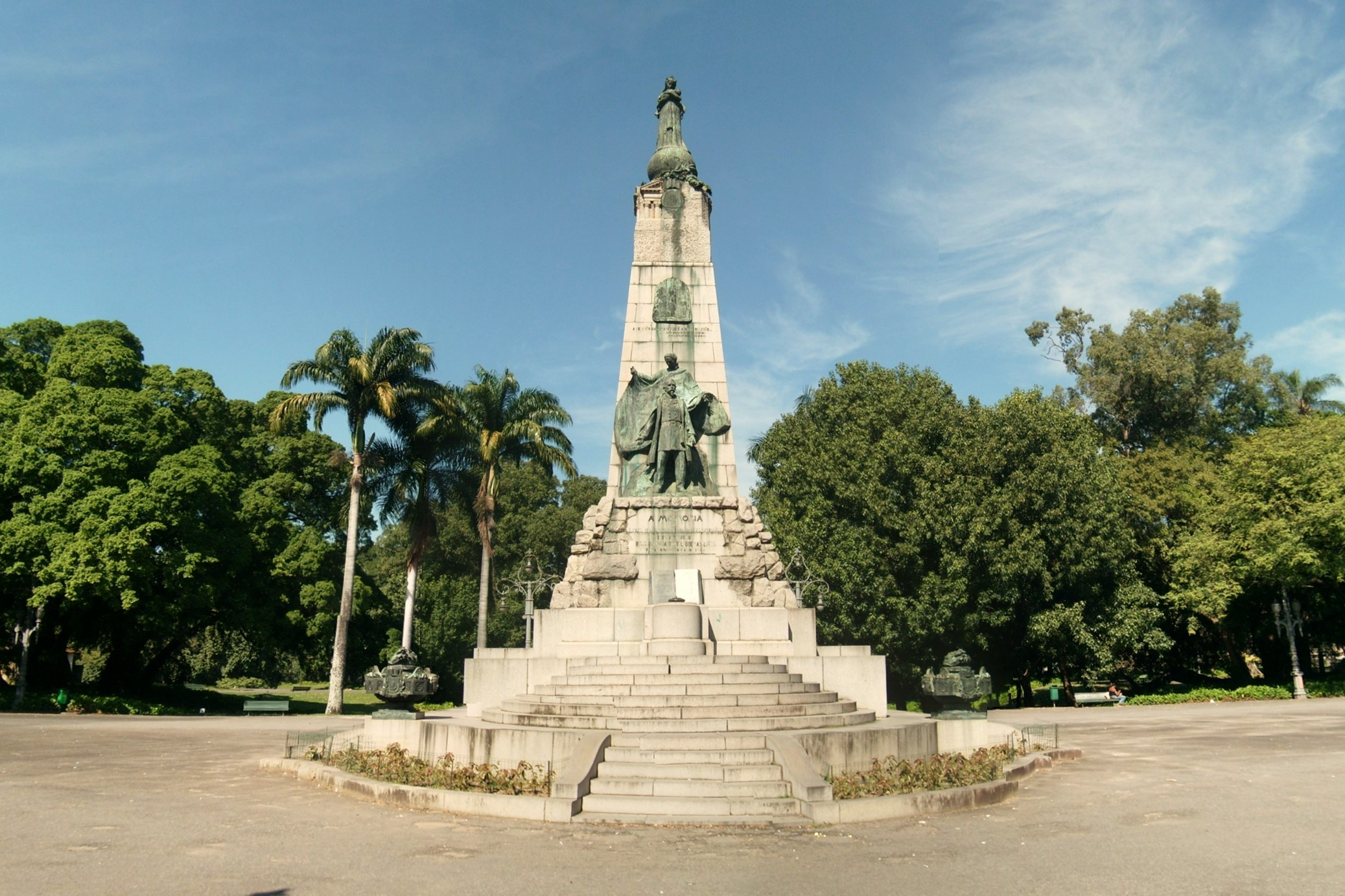 Monumento no Campo de Santana (ou Praça da República), no Centro do Rio de Janeiro.